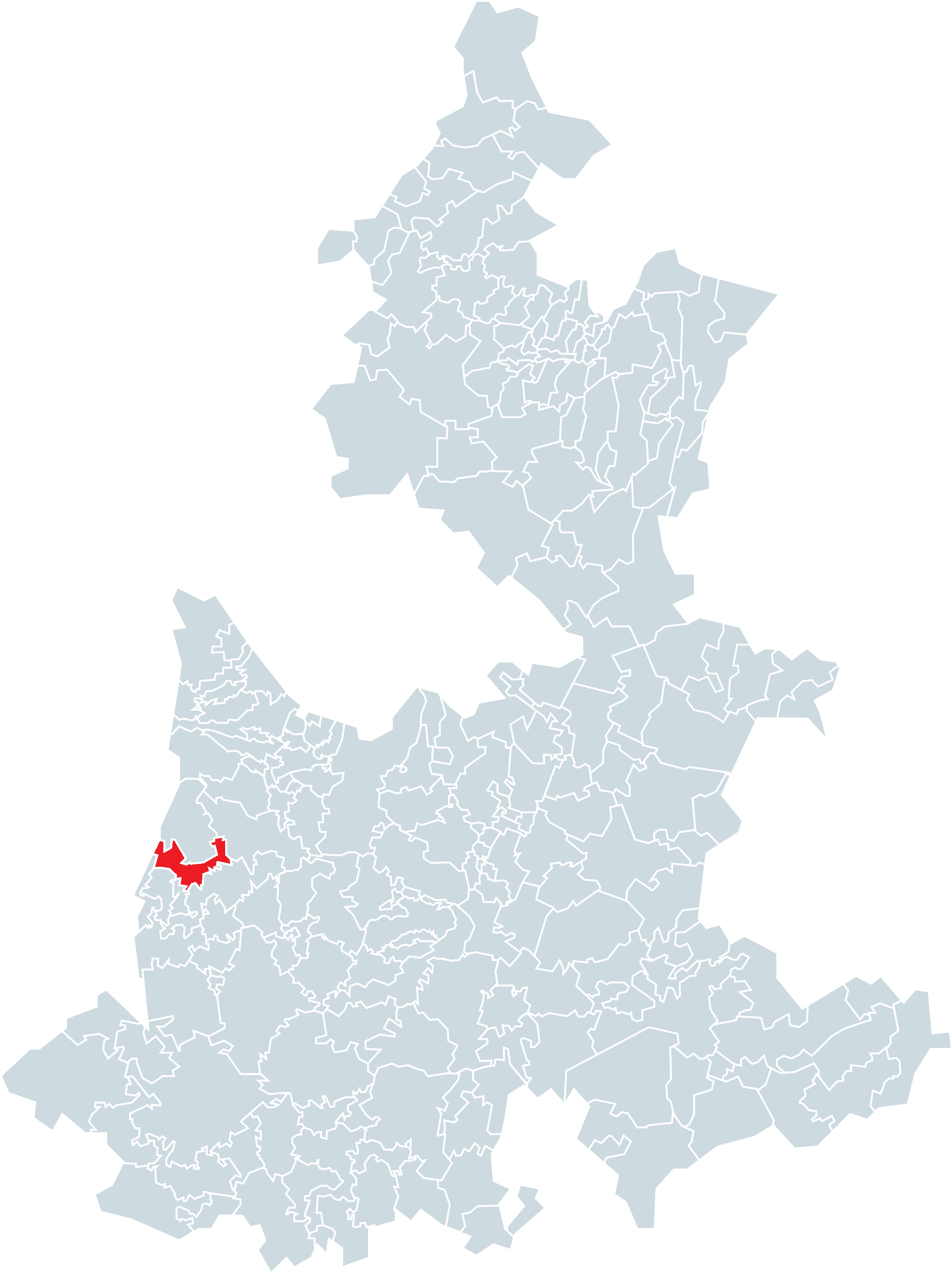 Municipio de Atzitzihuacán